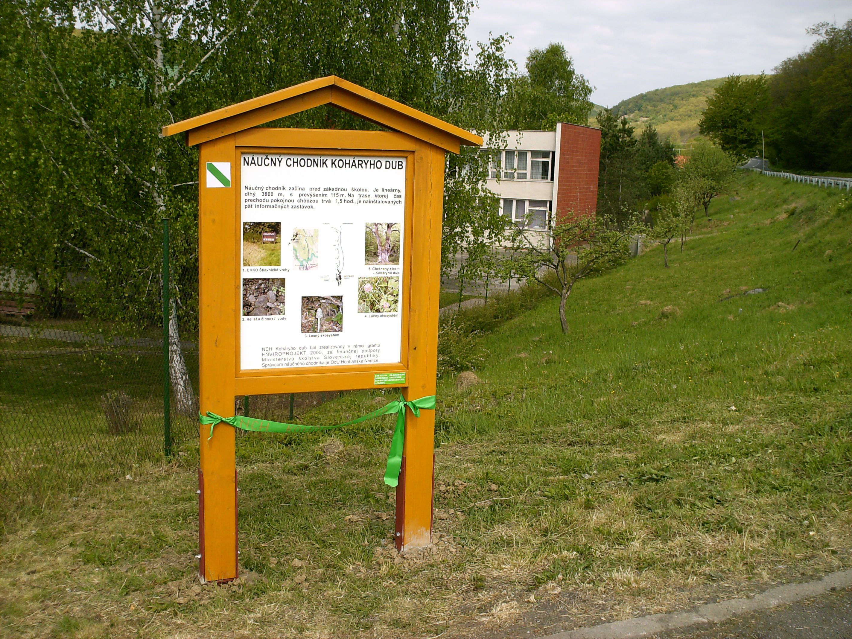 Náučný chodník Koháryho dub.